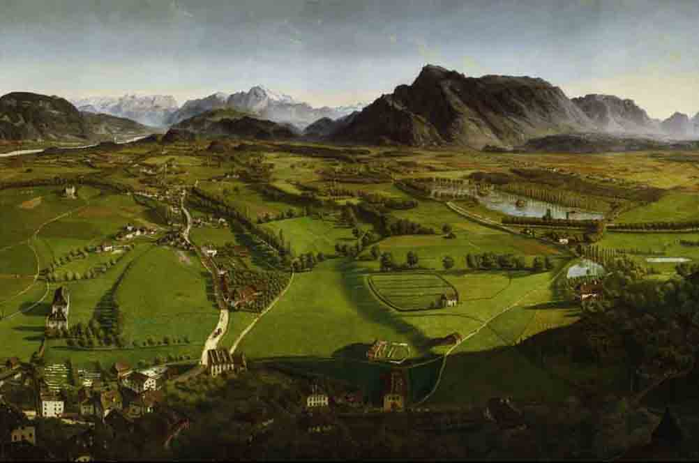 Panorama der Stadt Salzburg (1825-1829)von J. M. Sattler, Detail Blick nach Sueden; Salzburg Museum